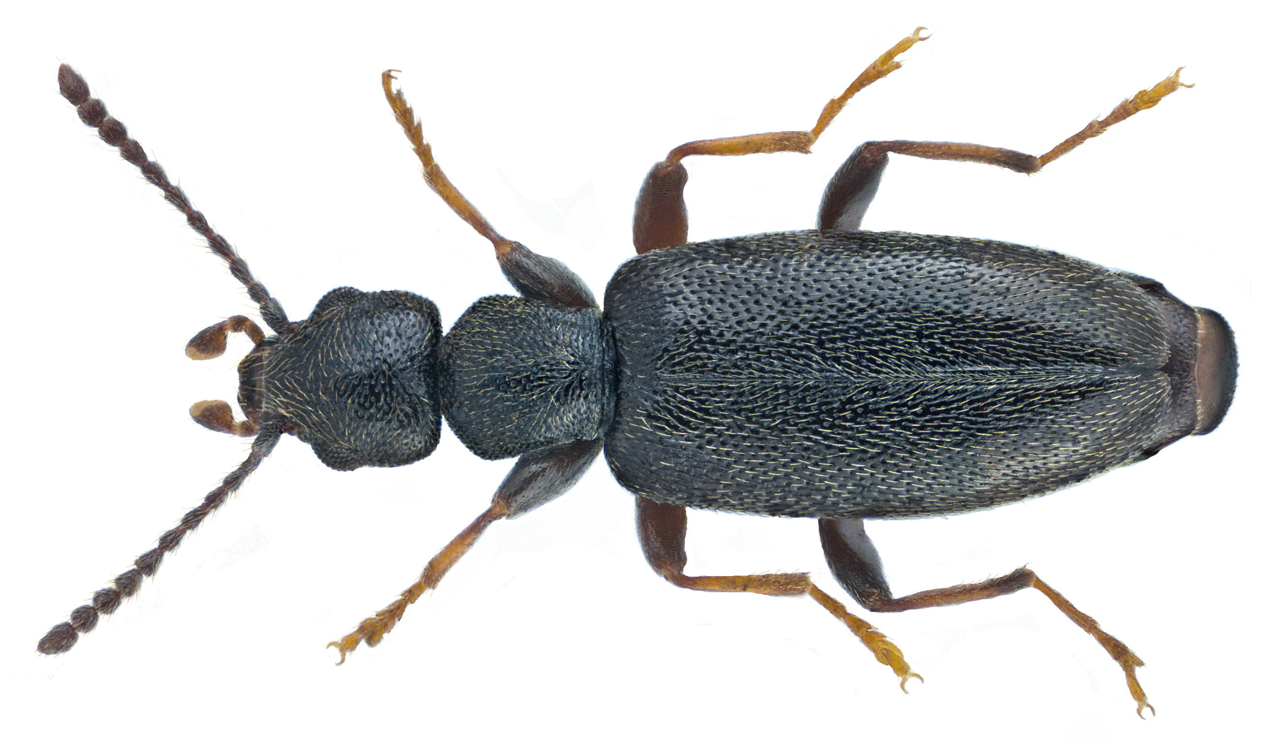 Family: Anthicidae Size: 3,4 mm Location: Turkey, Marmaris, Hisarönü leg. U.Schmidt, 18.V.1997; det. D.Telnov, 2008 Photo: U.Schmidt, 2015